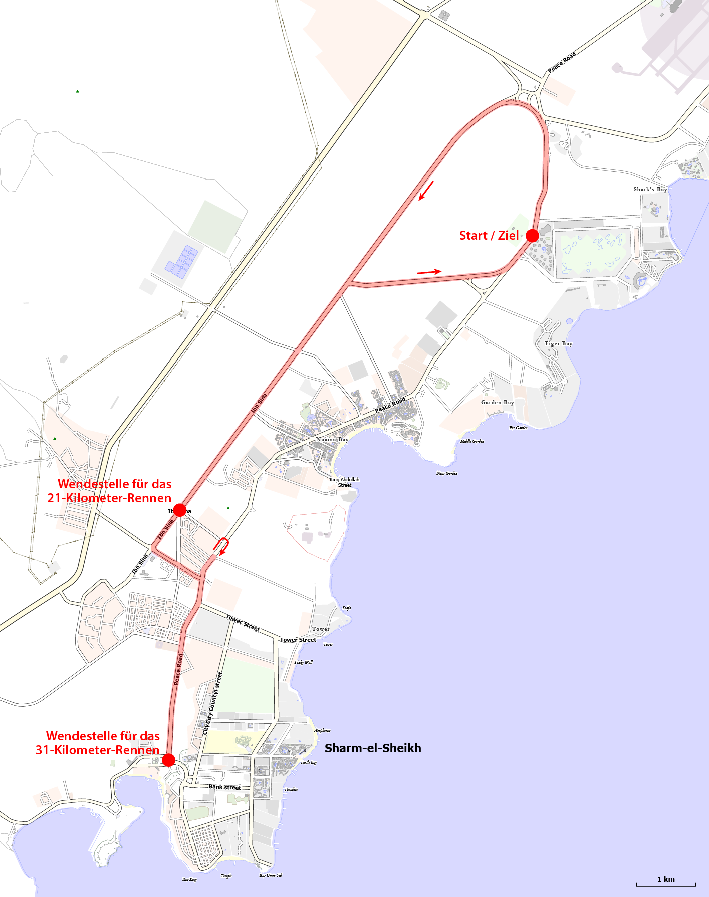 Streckenkarte der Afrikanischen Radsportmeisterschaften 2013 in Scharm El-Scheich